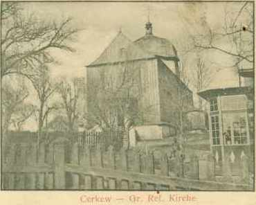 Cerkiew pod wezwaniem Zaśnięcia Najświętszej Marii Panny w Radymnie (1806-1905)